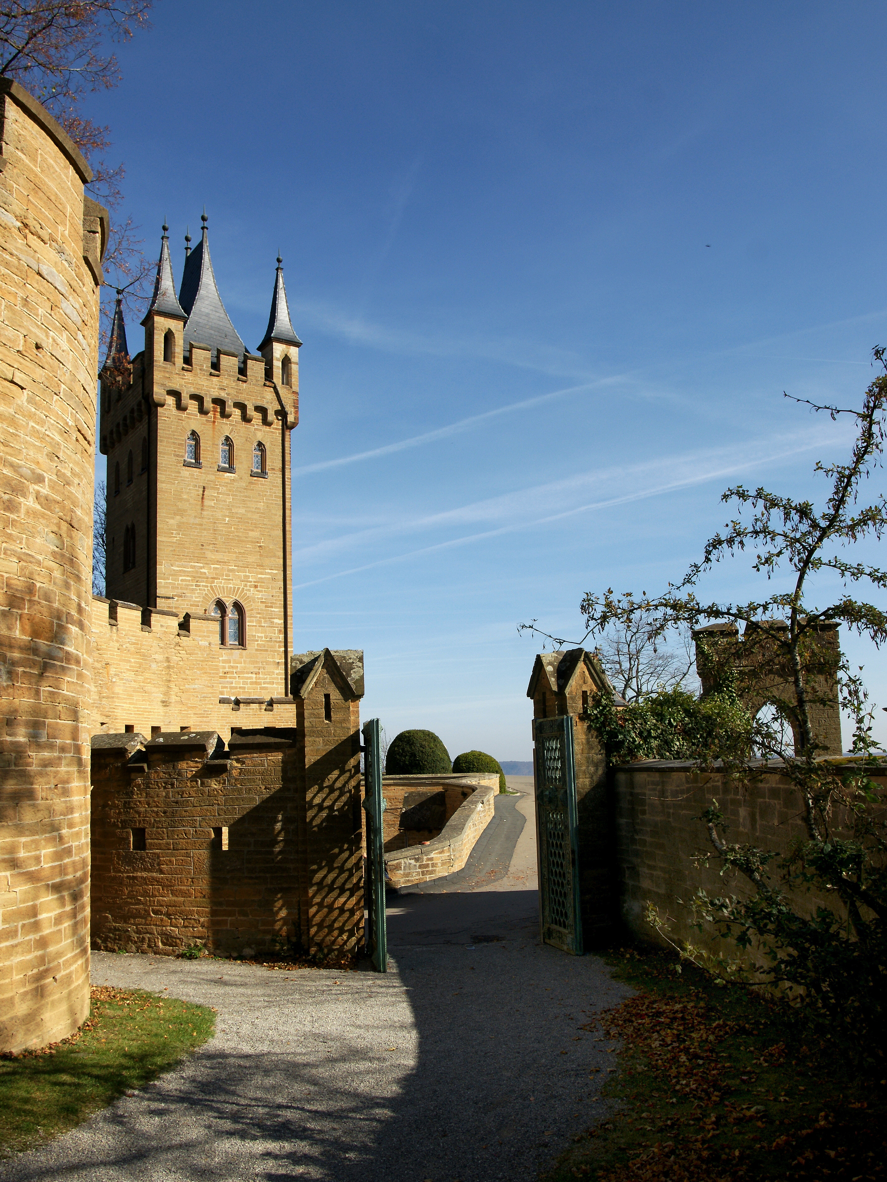 Impressionen auf der Burg Hohenzollern.